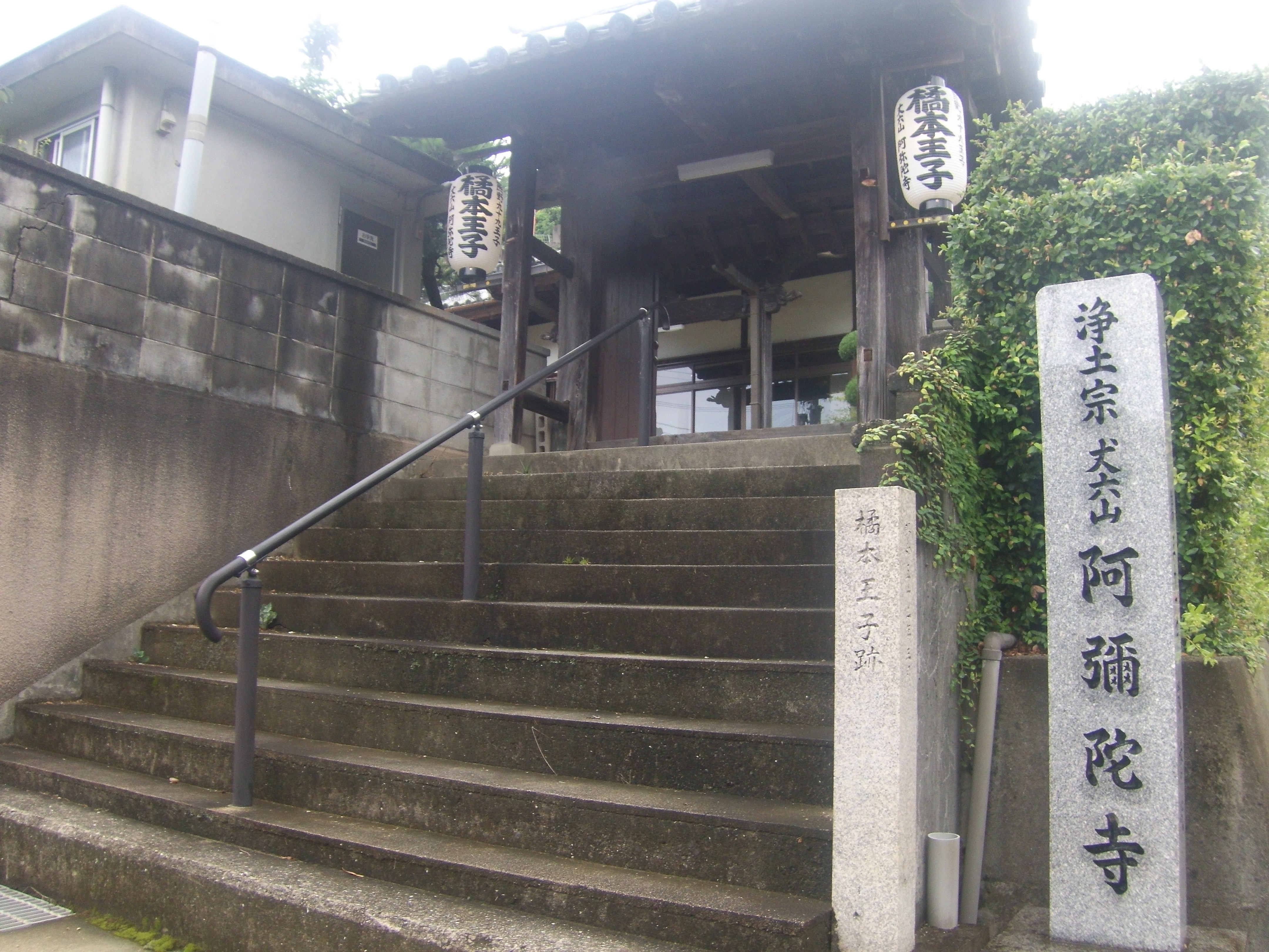 熊野古道・紀伊路の九十九王子の一つ橋本王子を祀る阿弥陀寺（和歌山県海南市）